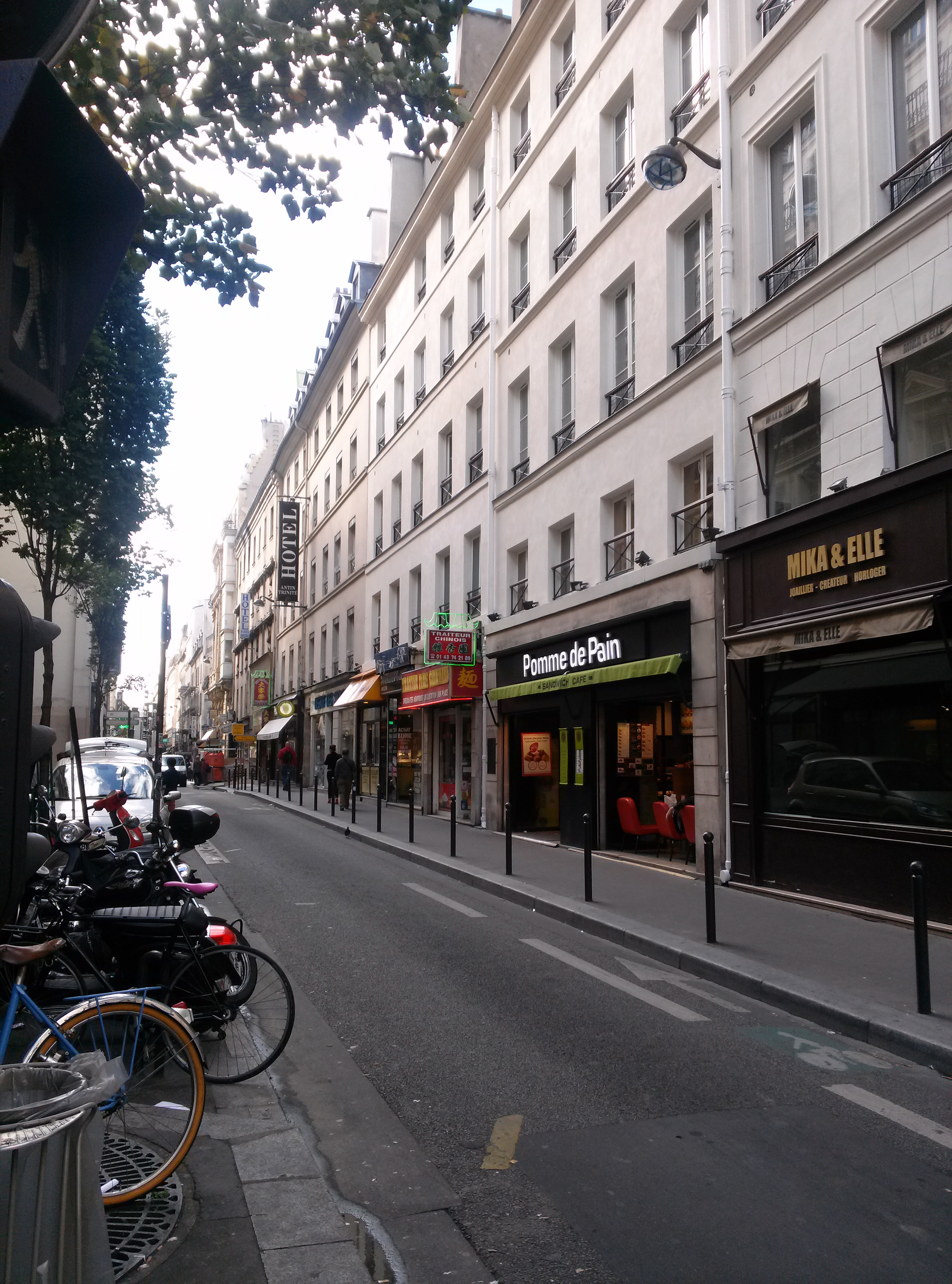 Vue de la rue de Provence à Paris depuis le croisement avec la rue de la Chaussée d'Antin, vers le numéro 80